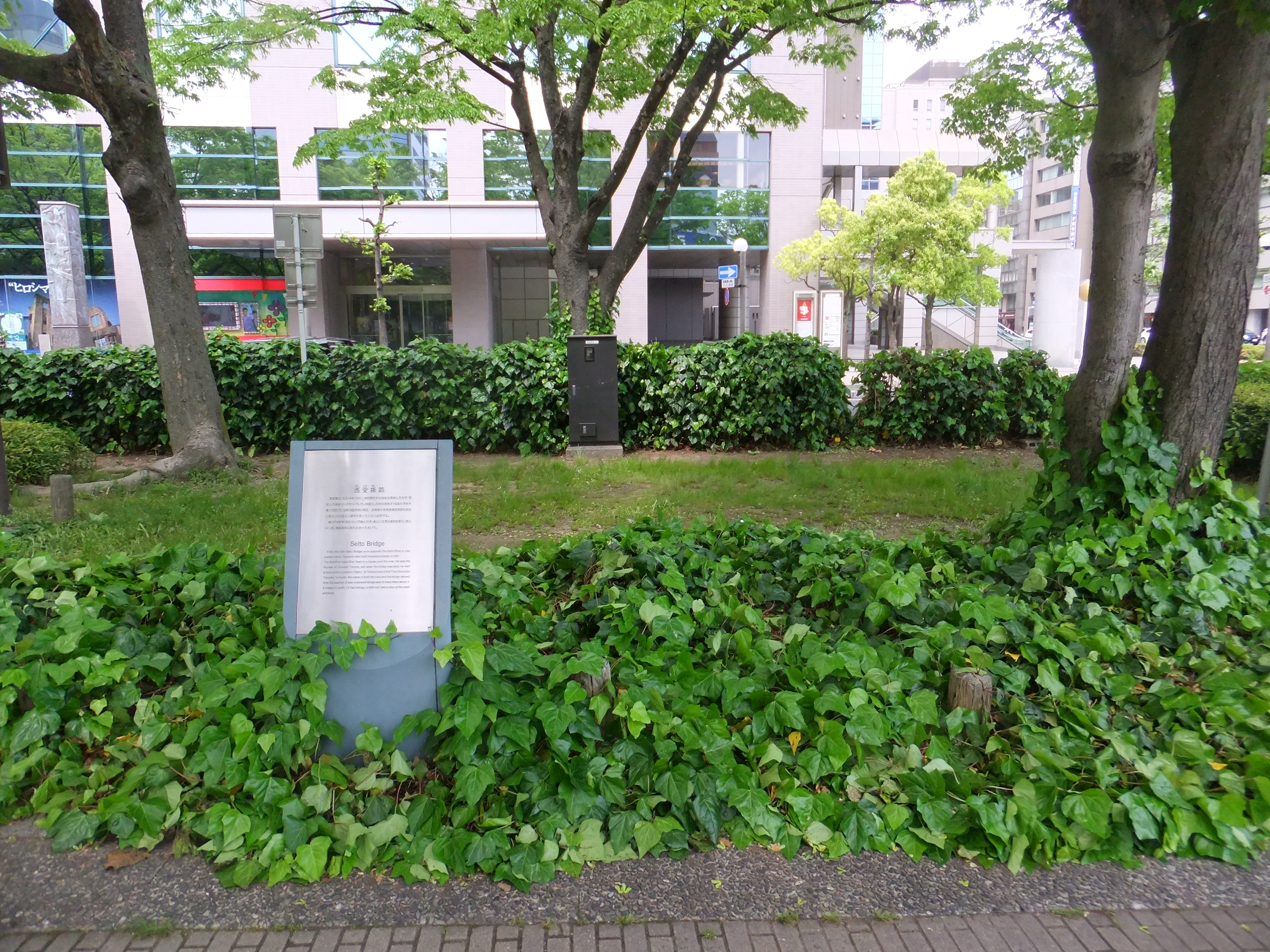 西堂橋跡